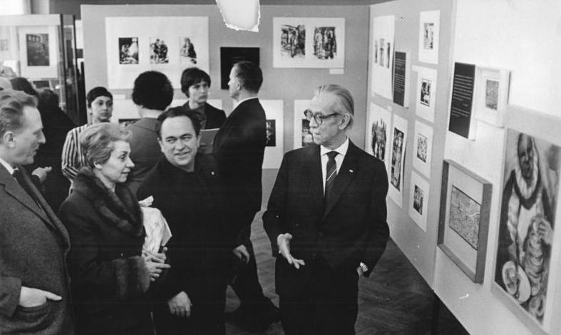 Berlin, Ausstellung, J. Grotewohl, Kies, Nagel Zentralbild Franke 29.3.1965 "Auf neuen Wegen" heißt die von der Deutschen Akademie der Künste zu Berlin und vom Institut für Volkskunstforschung beim Zentralhaus für Kulturarbeit am 29.3.1965 im Weißen Saal der Kongreßhalle am Alexanderplatz eröffnete Ausstellung mit Werken von Berufs- und Laienkünstlern. V.r.n.l.: Prof. Otto Nagel, Vizepräsident der Deutschen Akademie der Künste, Bildhauer Hans Kies und Frau Johanna Grotewohl vor einem von Otto Grotewohl gemalten Aquarell "Die Brezelfrau vom Braunschweiger Markt. Abgebildete Personen: Nagel, Otto Prof.: Maler, Präsident der Akademie der Künste (AdK), Nationalpreisträger, Vaterländischer Verdienstorden (VVO) in Gold, DDR (GND 118586300)